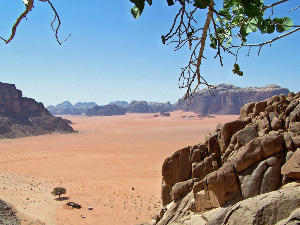 Wadi Rum